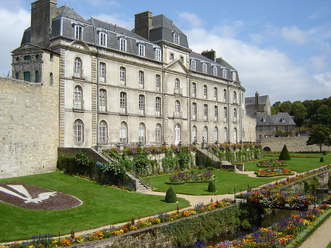 château de vannes